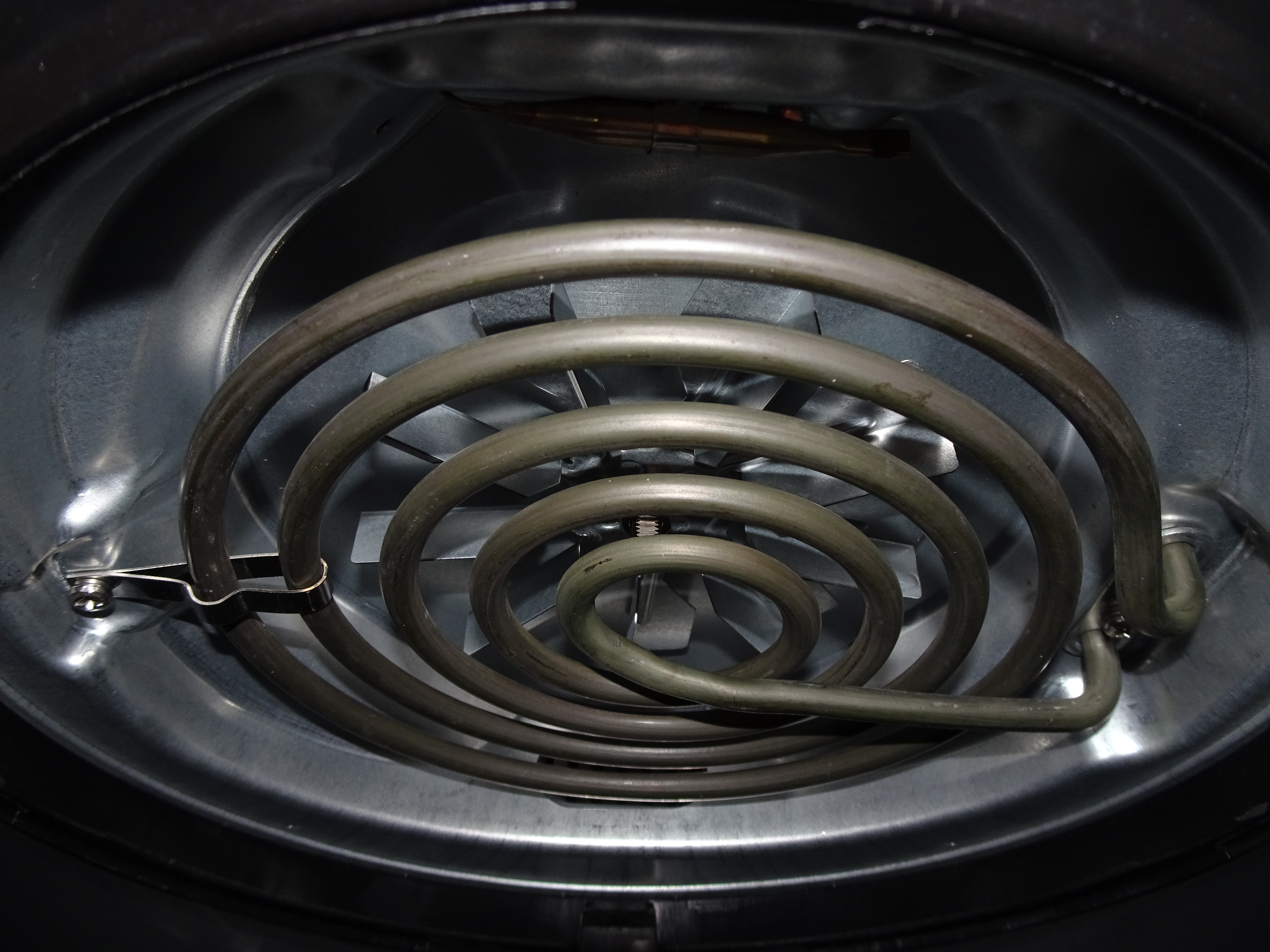 Verwarmingselement aan de bovenkant in verwarmingsruimte van een airfryer